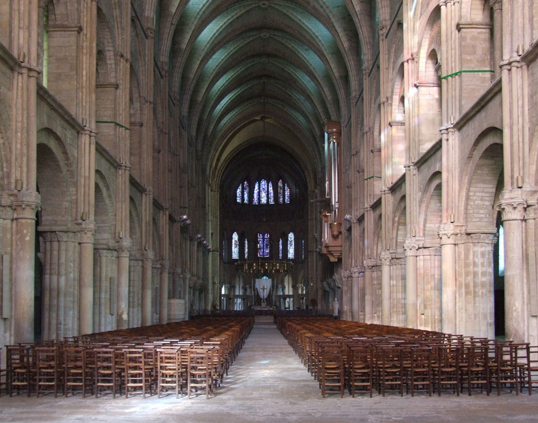 Basilique Saint-Remi (Basilica St. Remigius), Reim, France